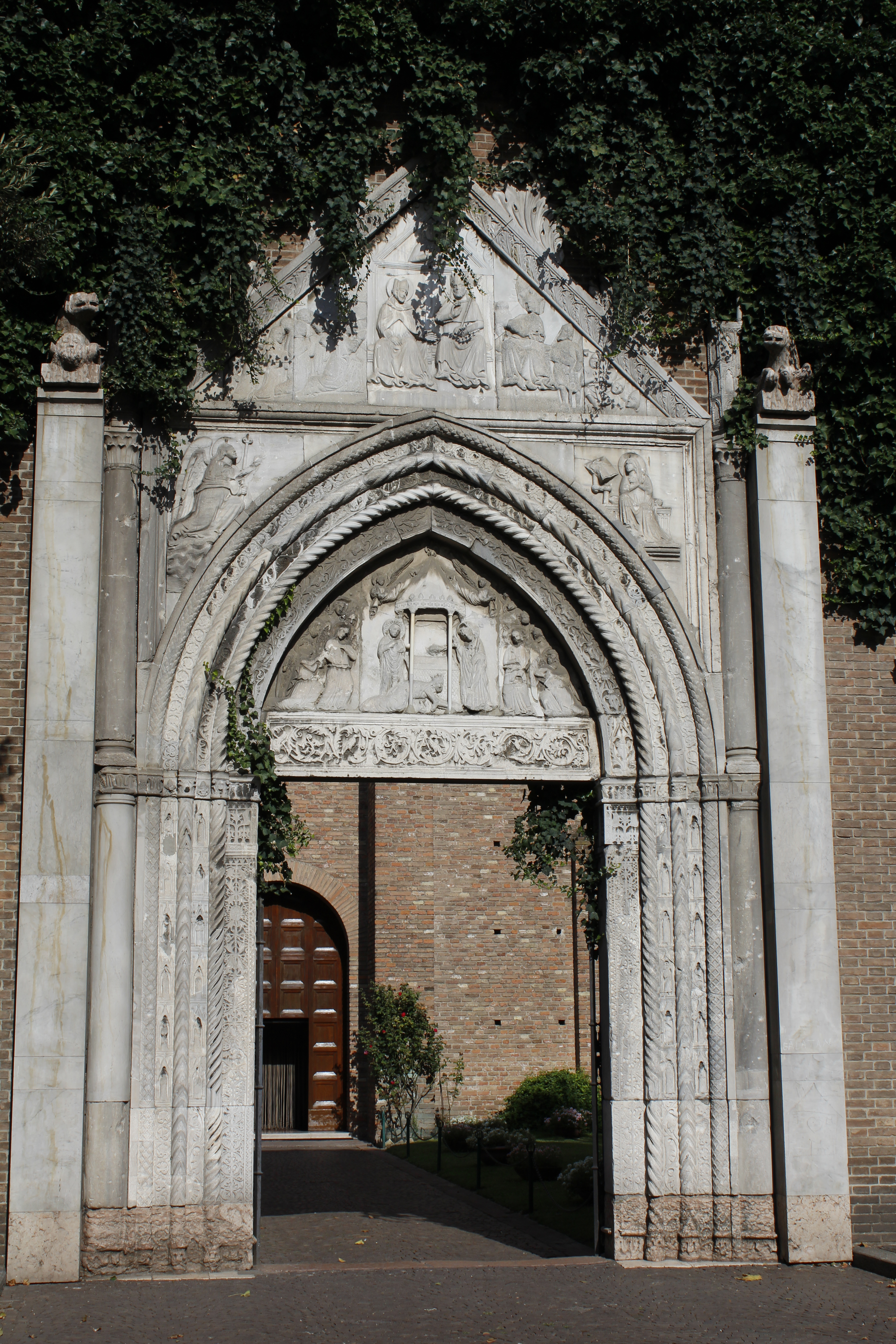 Chiesa di San Giovanni Evangelista, Ravenna